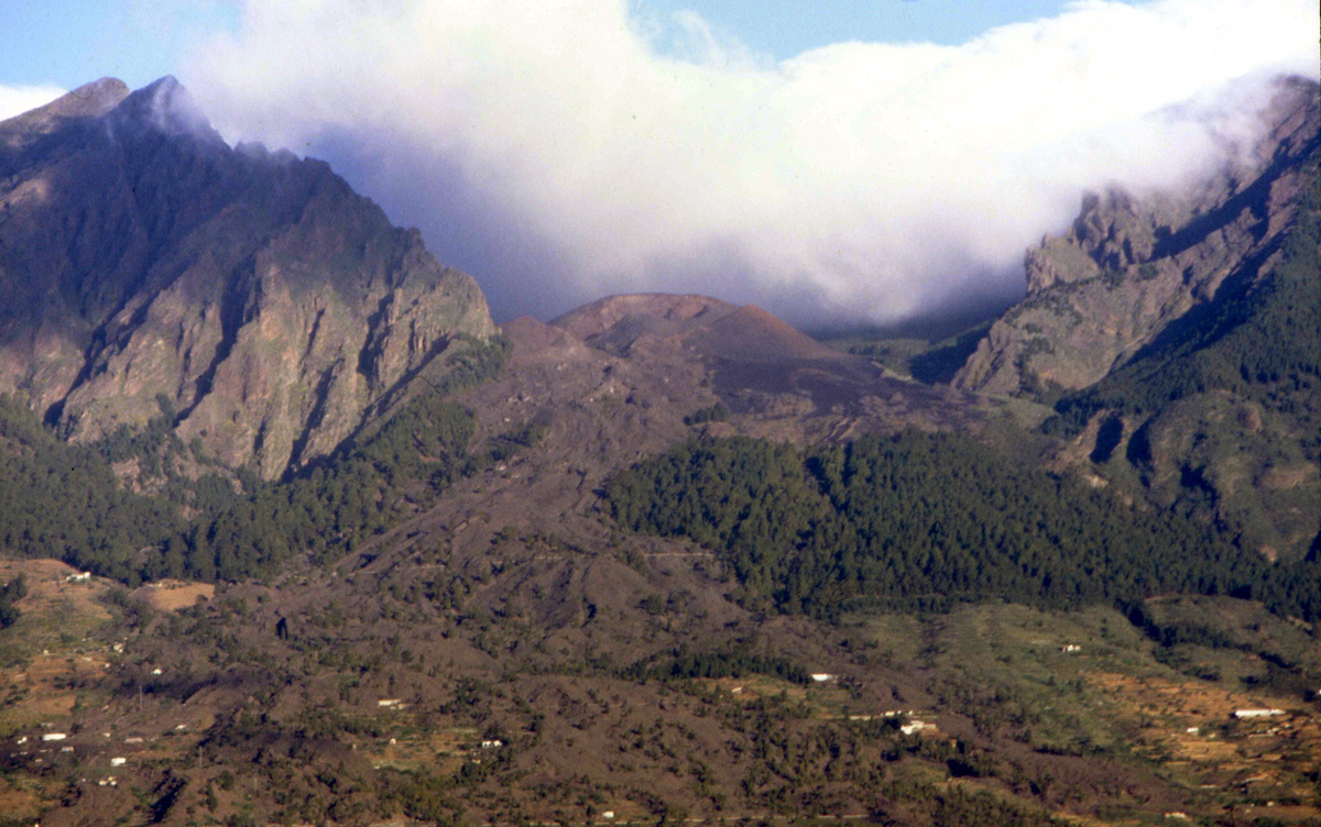 Vista del volcán de las arenas desde la Montaña de El Socorro. La erupción de este volcán tuvo lugar en 1705